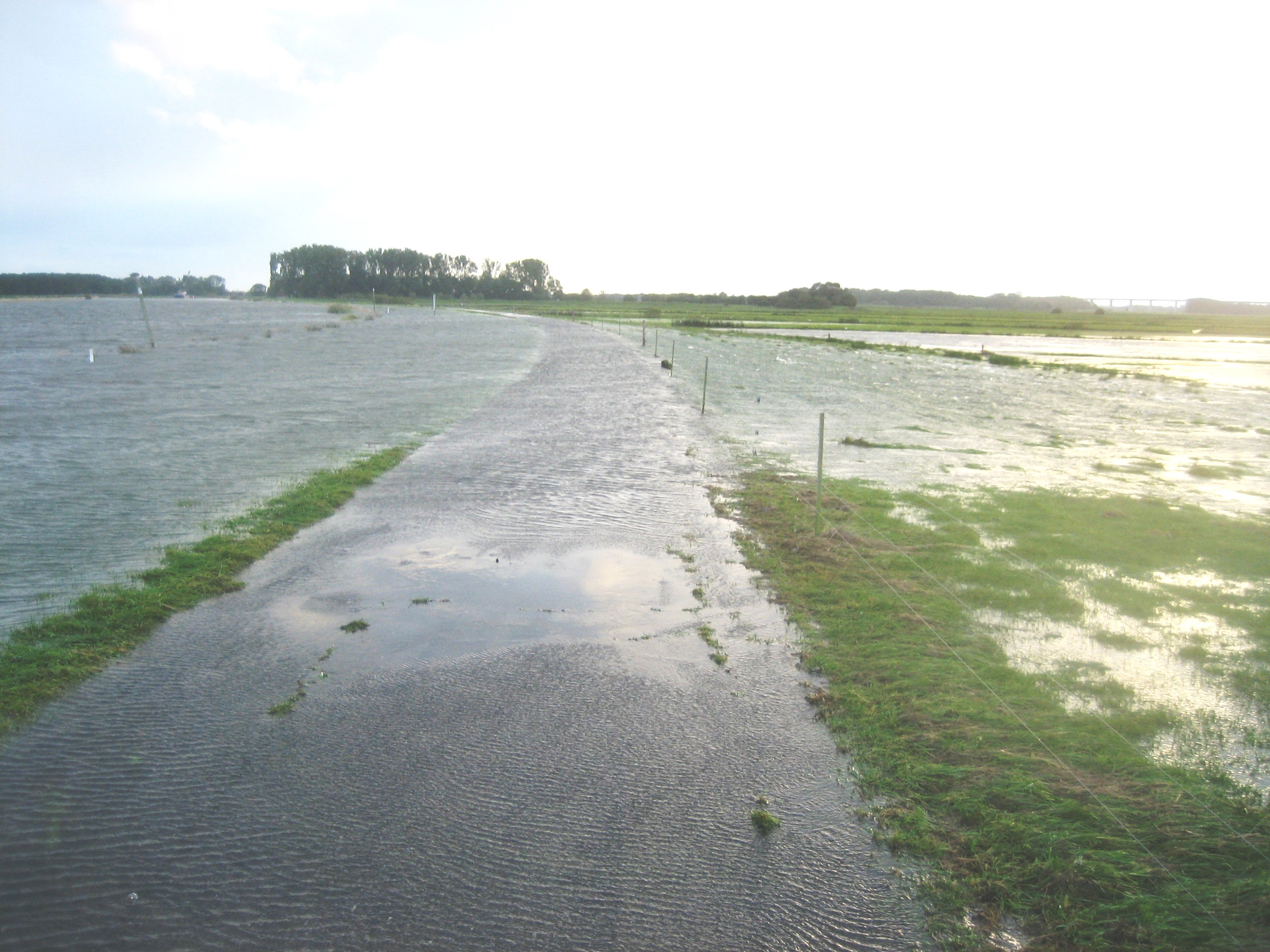 Vernässung des Moorhauser Polders